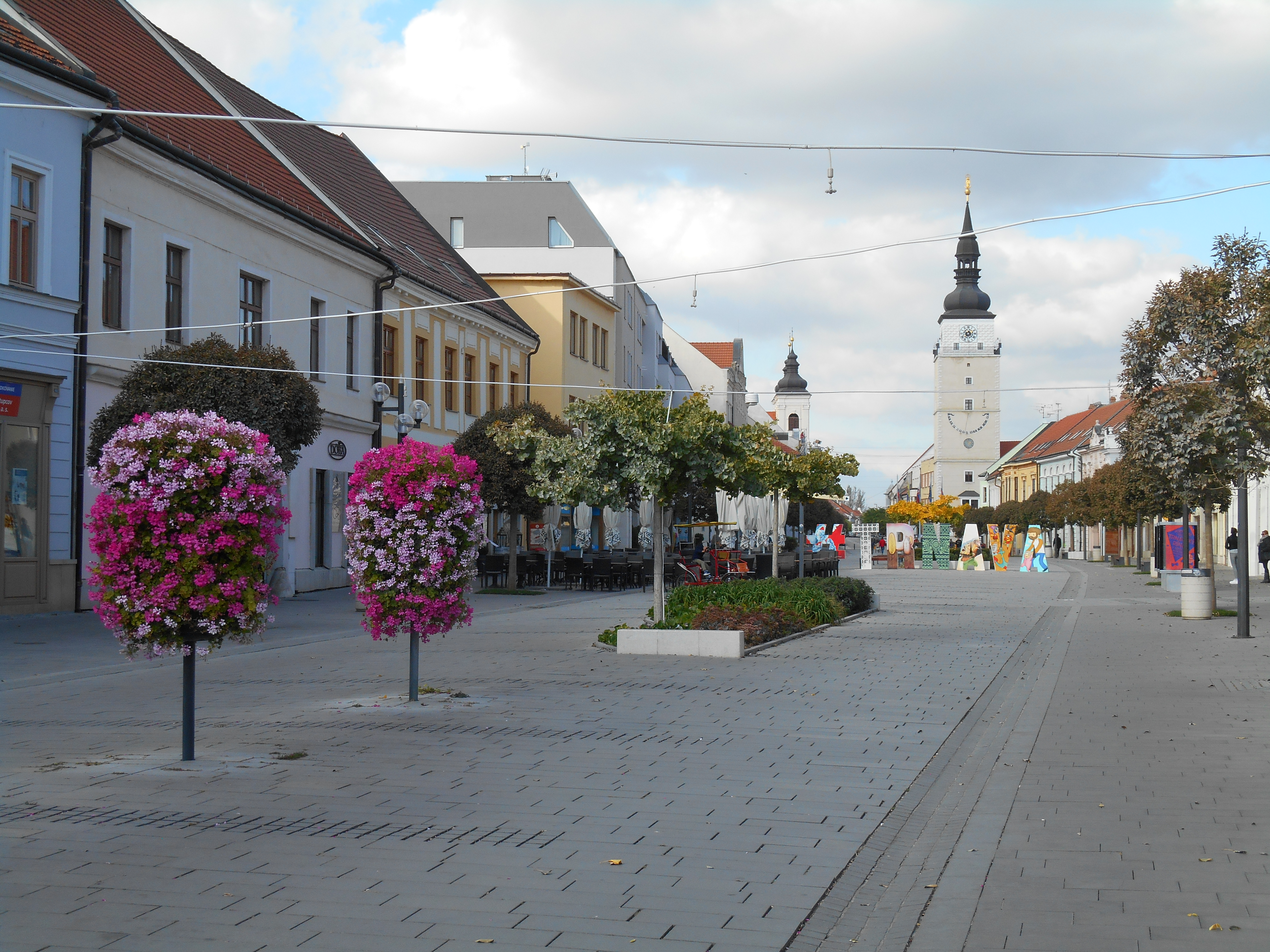 Pešia zóna Trnava